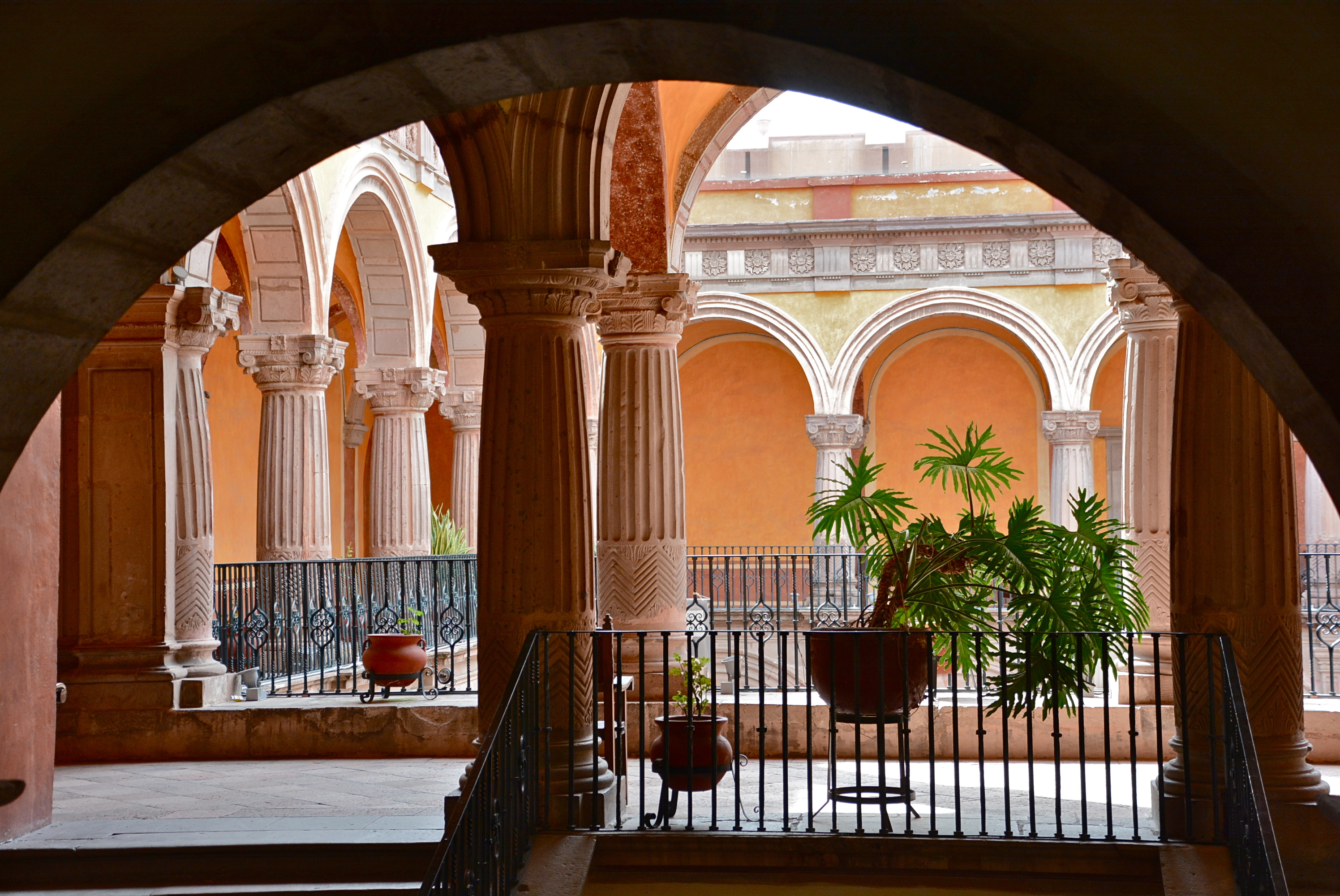 Vista desde el interior del Museo Regional de Querétaro hacia su patio central. Ex convento de San Francisco.